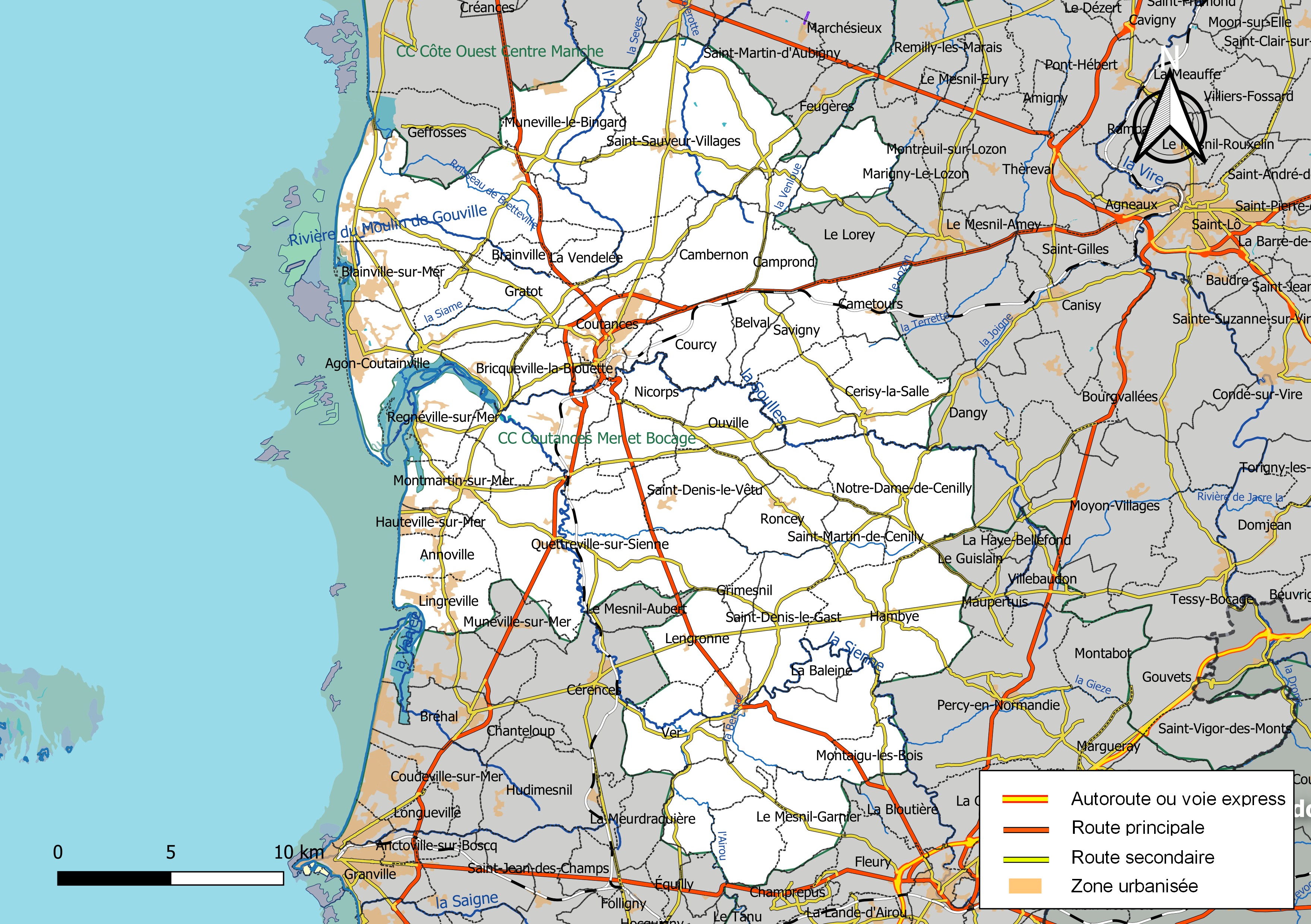 Carte géographique de la Communauté de communes Coutances Mer et Bocage, département de la Manche, France. Composition au 1er janvier 2019.